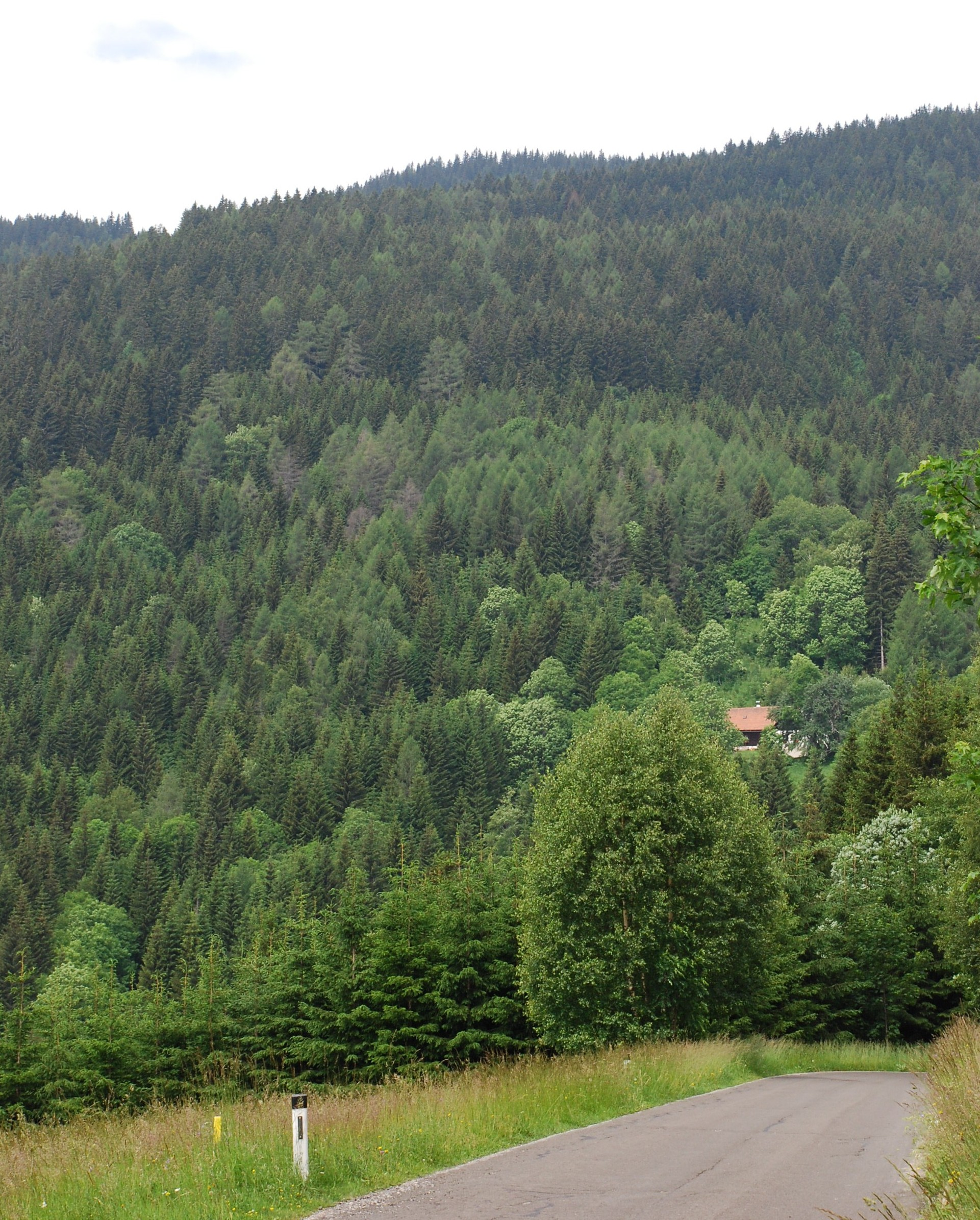 Klosterwinkel-Gratzen in der Gemeinde Kloster, im Hintergrund die Kuppe des Schwarzkogels